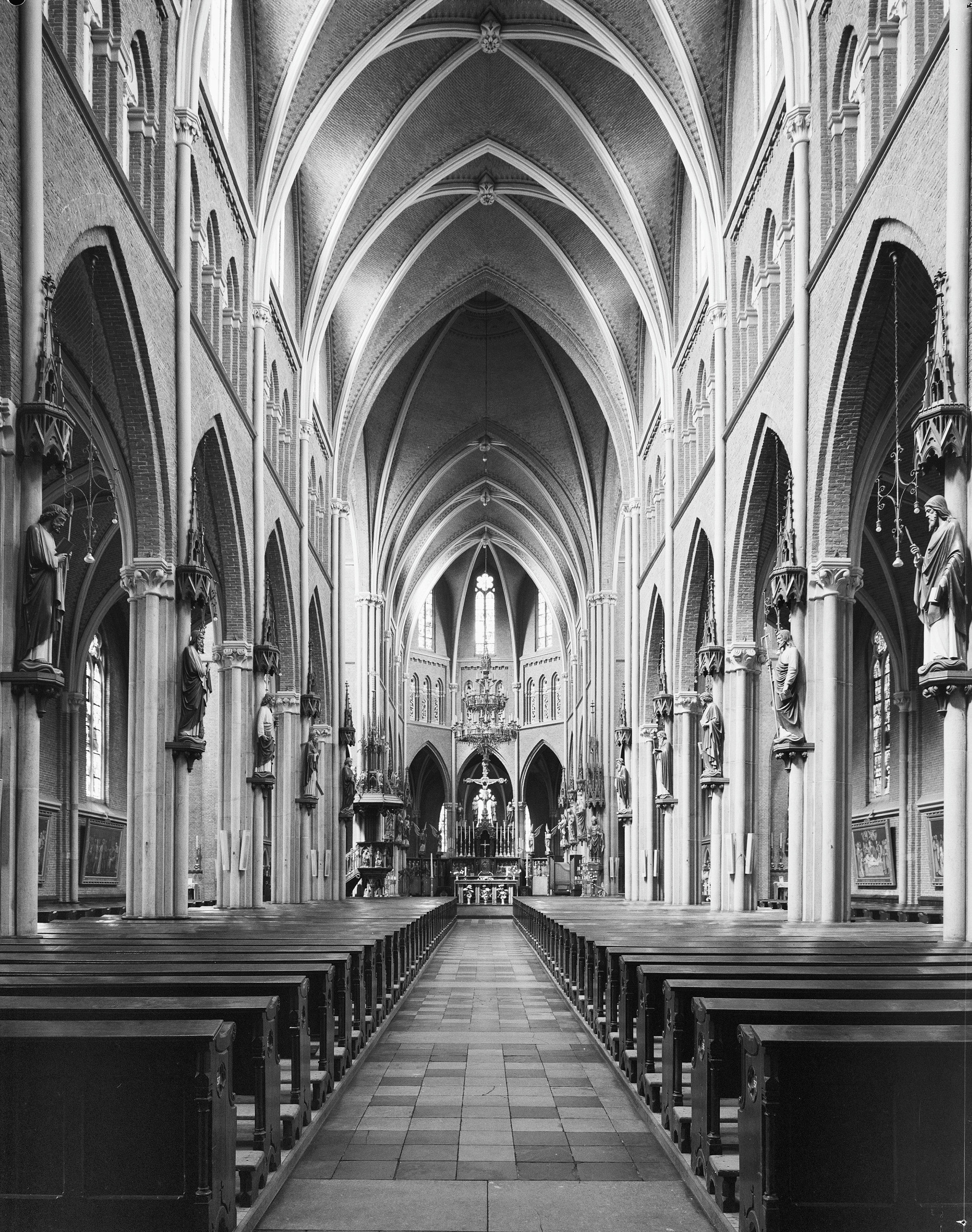 Rooms-Katholieke Kerk: interieur naar het koor